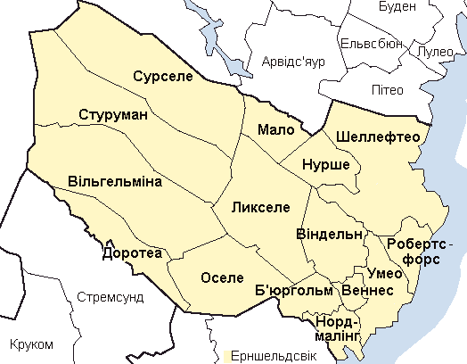 Карта адміністративного поділу лену Вестерботтен у Швеції. Карту створено на основі карти File:Västerbotten County.png.